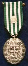 Medalha comportamento exemplar grau prata